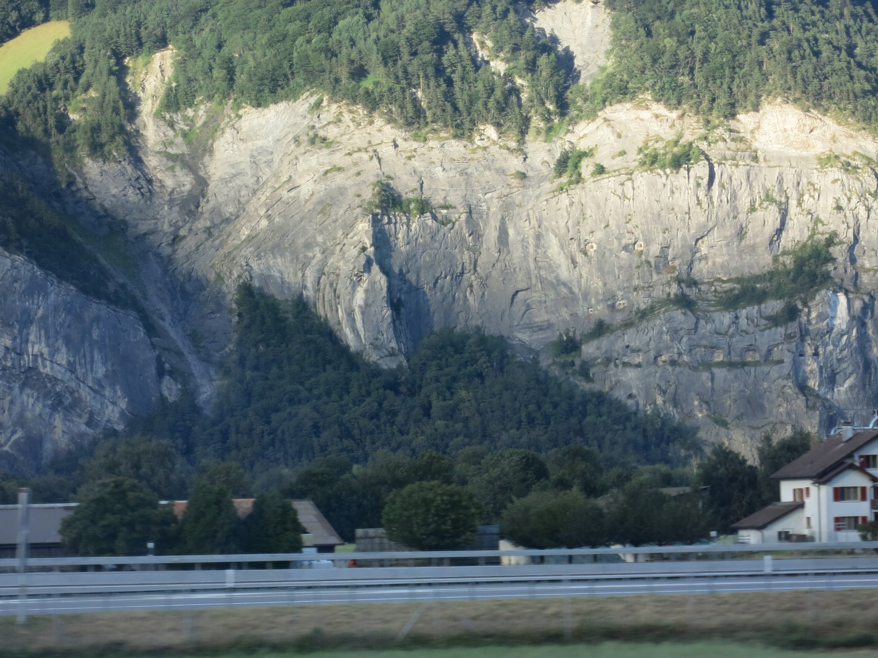 Artilleriewerk Tschingel GR, Schweiz